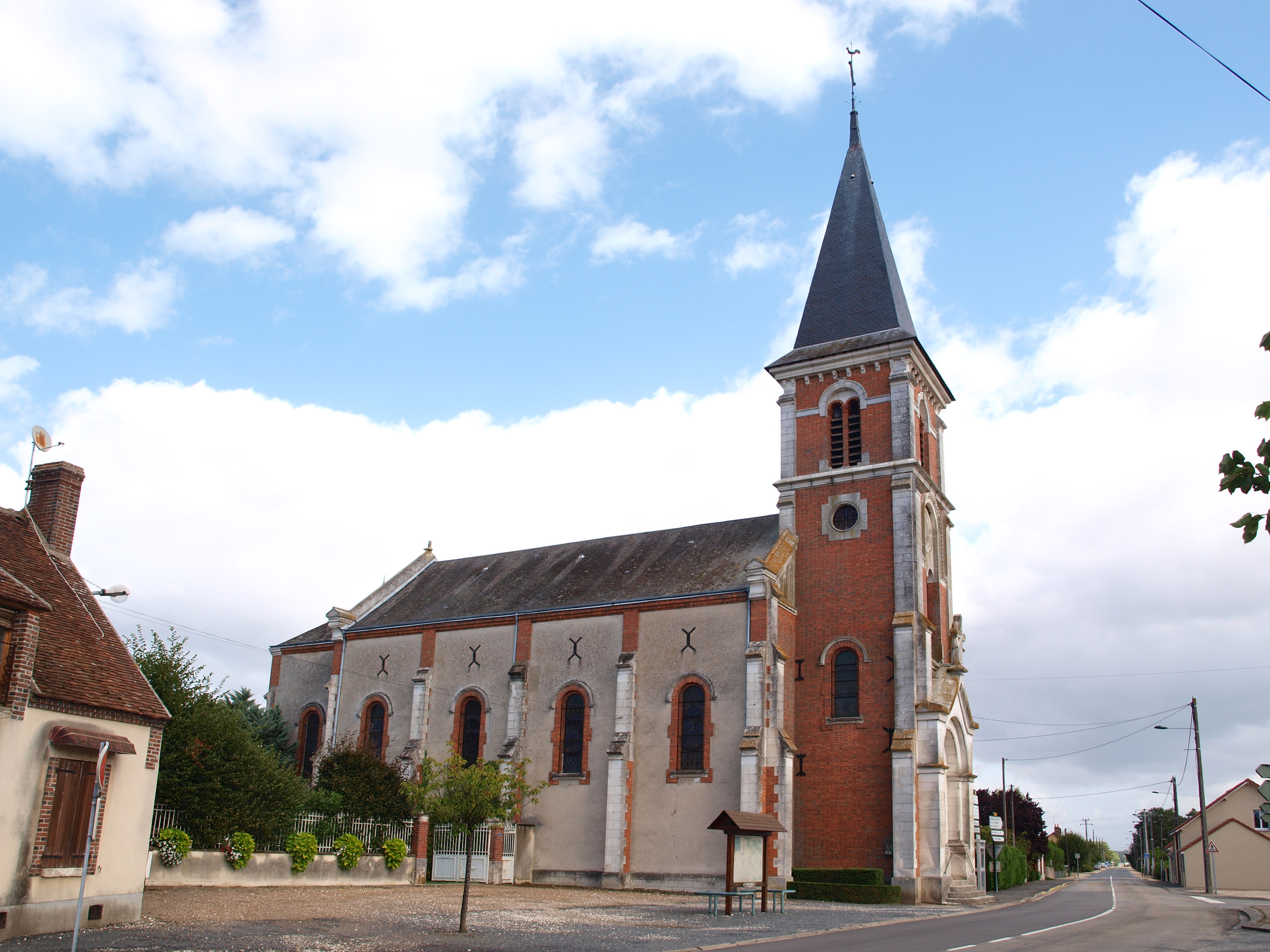 Les Choux (Loiret, France) ; église